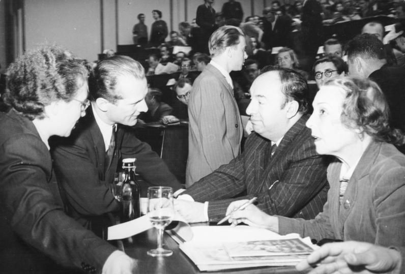 Berlin, III. Weltfestspiele, Vorbereitung ADN-ZB / Quaschinsky 19.5.1951 Berlin: 2. Tagung des Internationalen Festkomitees für die III. Weltfestspiele vom 19.-20.5.1951 im Haus der Volkskammer. Erich Honecker, Vorsitzender der FDJ, im Gespräch mit dem chilenischen Dichter Pablo Neruda und dessen Gattin (r.). Abgebildete Personen: Honecker, Erich: Staatsratsvorsitzender, Generalsekretär des ZK der SED, DDR (GND 118553399) Neruda, Pablo: Schriftsteller, Lyriker, Nobelpreis für Literatur 1971, Chile